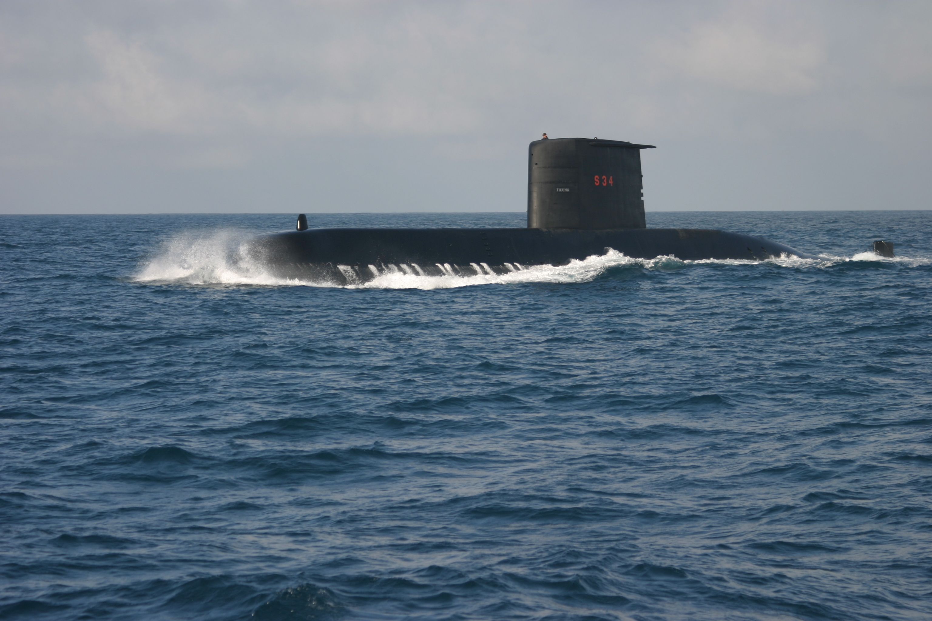 Arquivo liberado pela Marinha do Brasil através de projeto GLAM com Wiki Educação Brasil